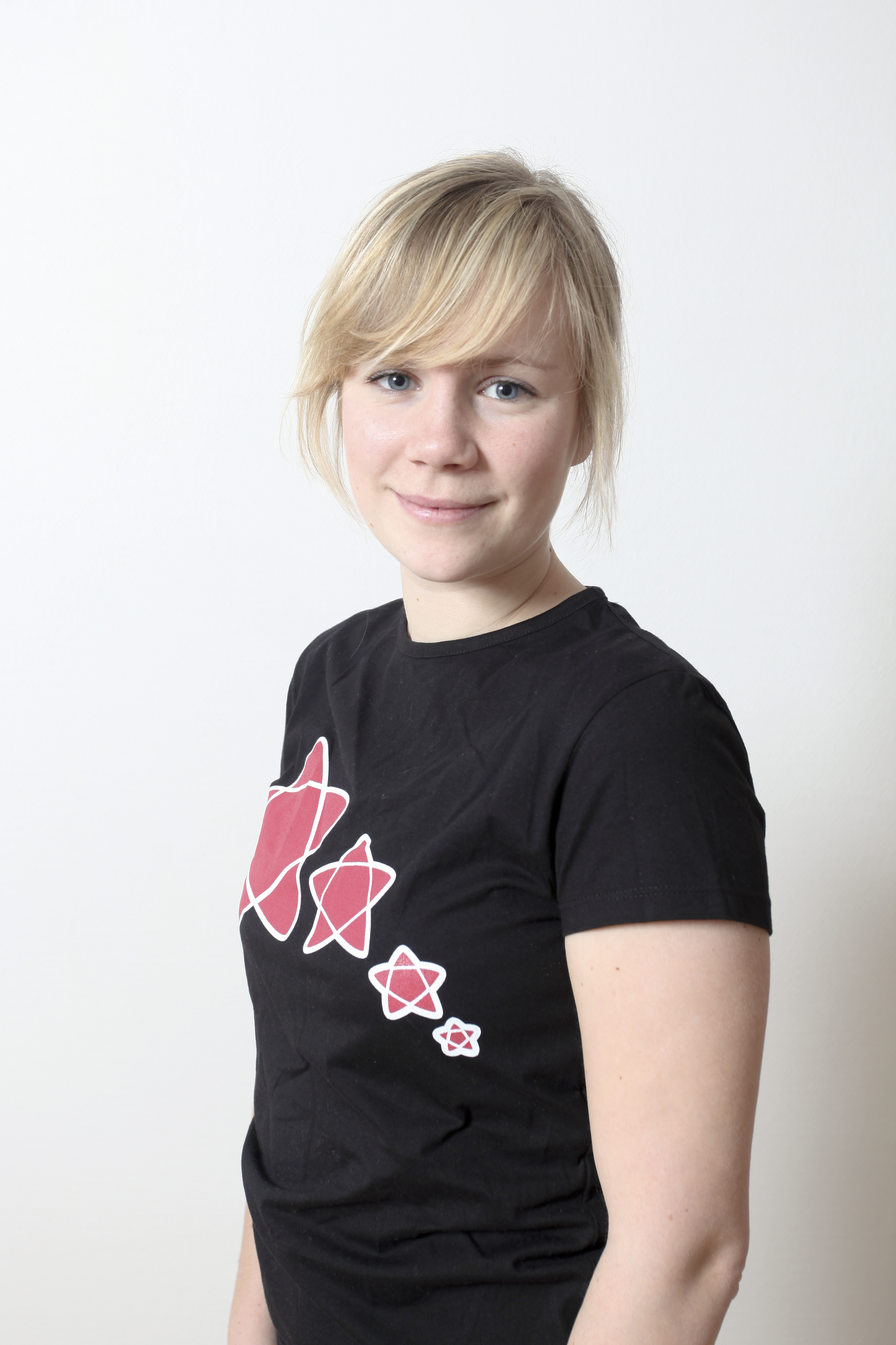 Ingeborg Steinholt, 1. kandidat for Rødt Nordland stortingsvalget 2009